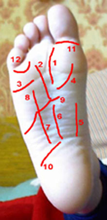 Гадание по ступням